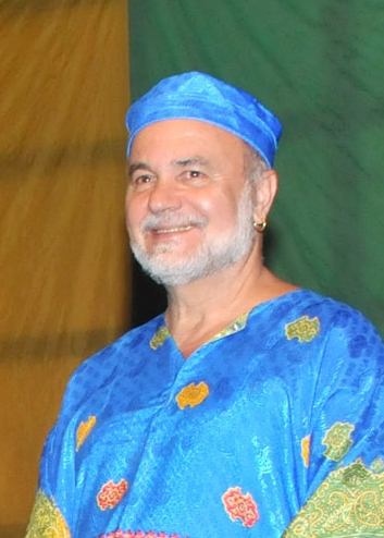 O ativista LGBT Luiz Mott durante cerimônia de entrega ao ministro da Cultura Juca Ferreira um troféu por apoiar luta pelos direitos civis. Data: 08/09/2010 Foto: Roberto Abreu